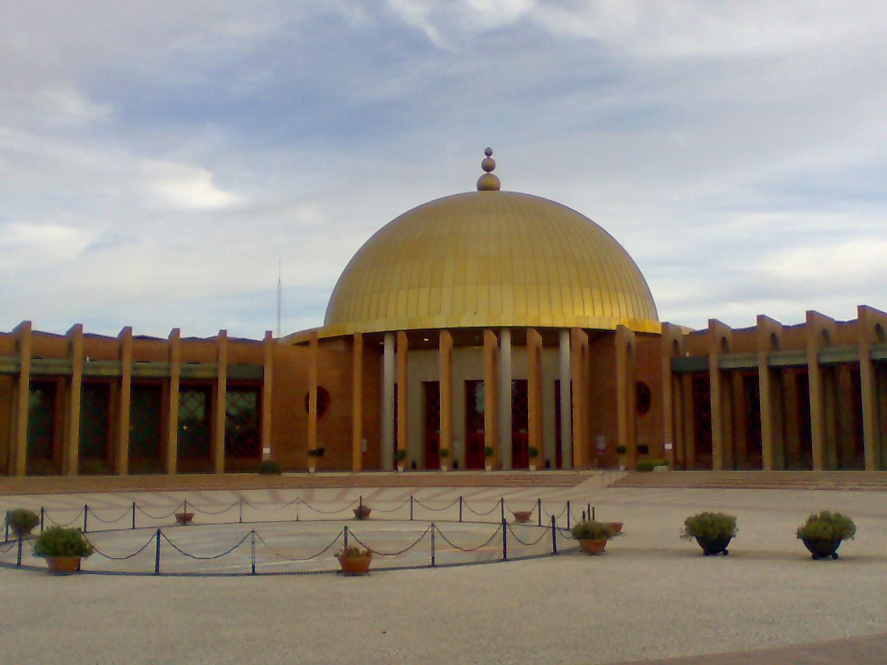 Palacio de Congresos y Expociciones FIBES Sevilla